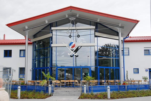 Clubhaus des Mannheimer Hockeyclub